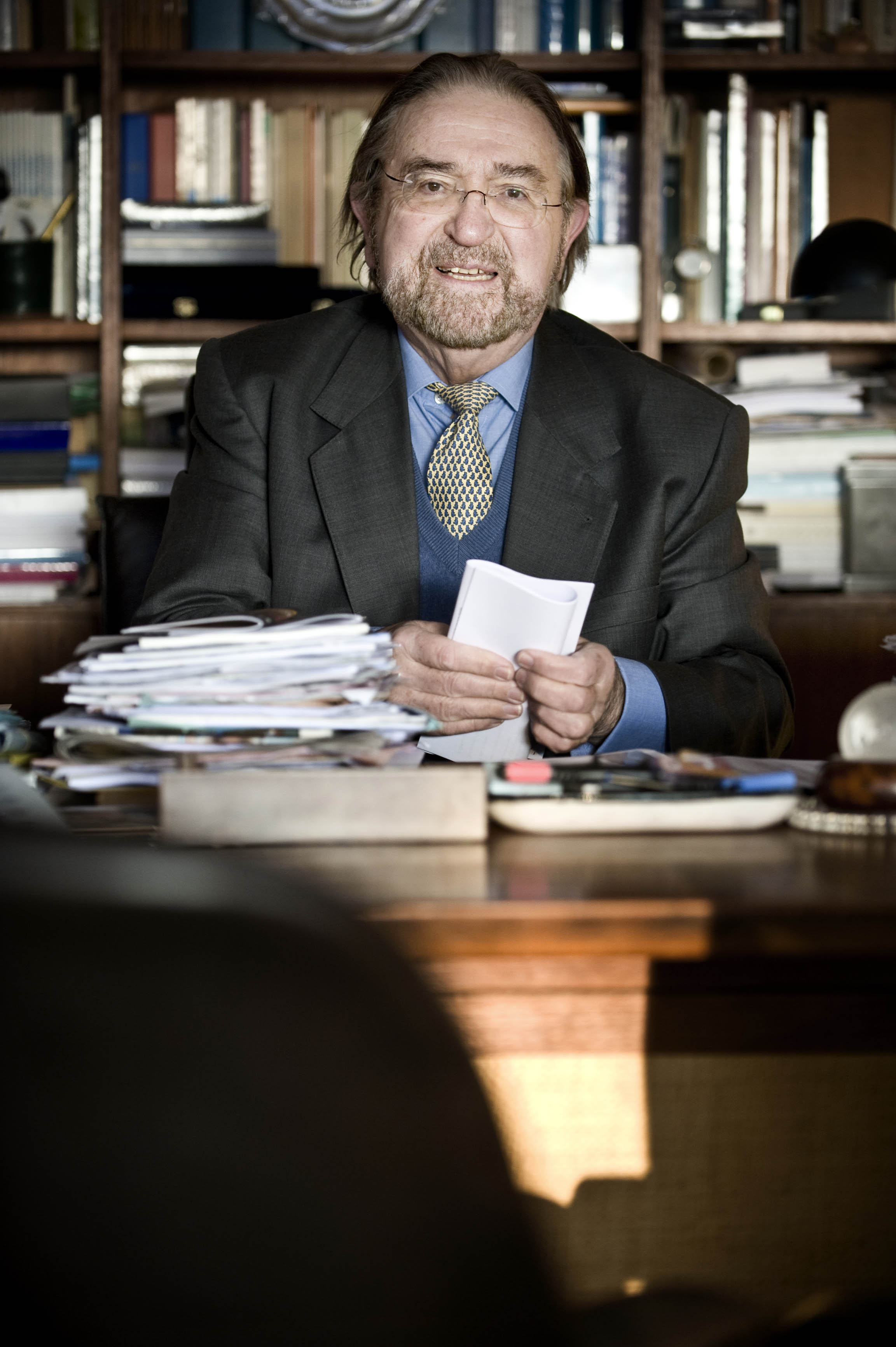 Herman De Croo (open VLD) achter zijn bureau bij hem thuis in Michelbeke.